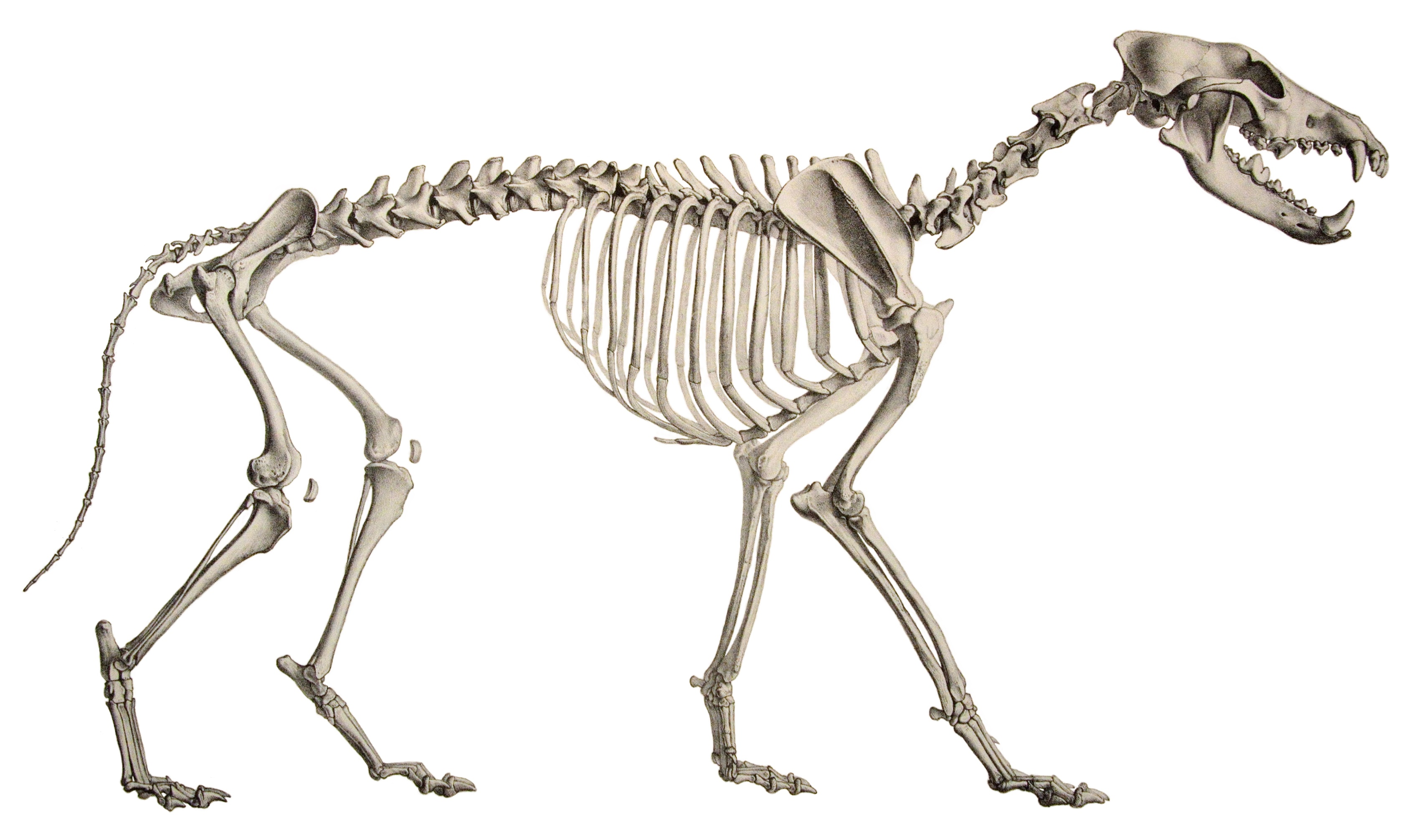 Wolf skeleton